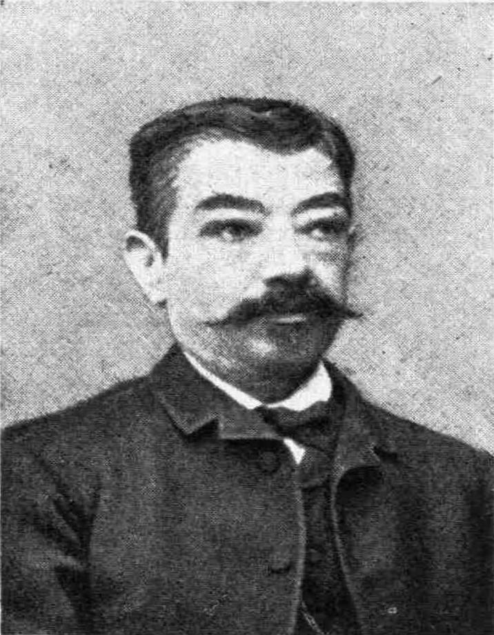 griechischer Universitätsprofessor, 19. Jahrhundert